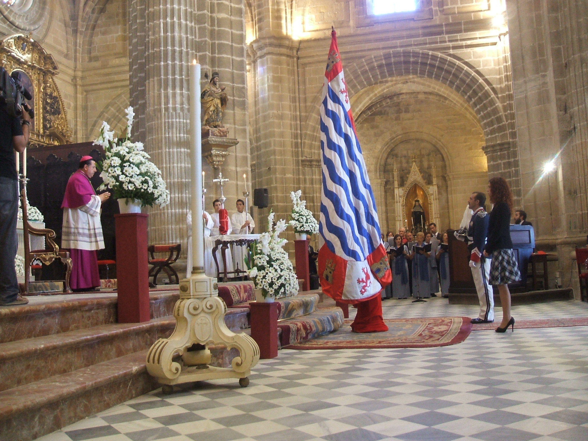 Presentacion del Pendon de la Ciudad de Jerez de la Frontera (España) ante el Patron San Dionosio Aeropagita con solemne "Te Deum".